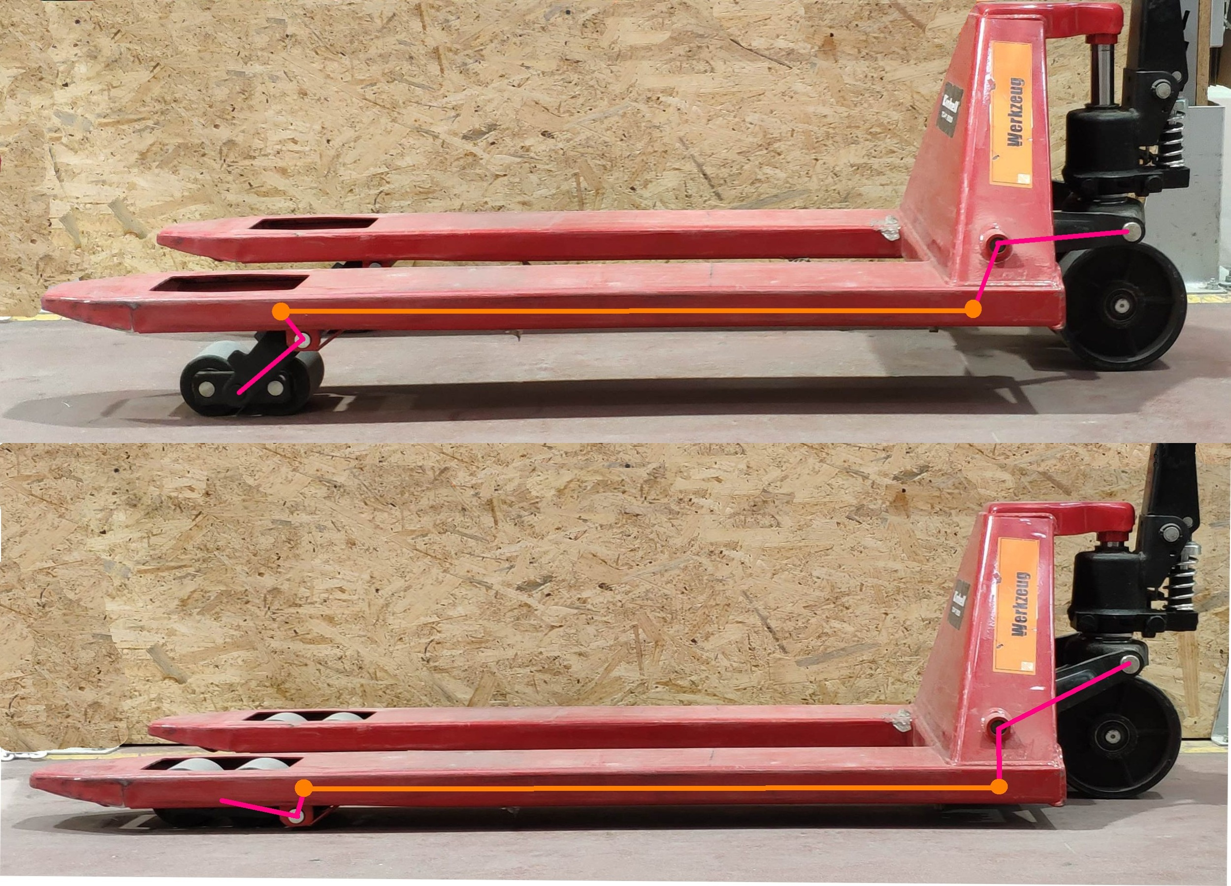 Beim Anheben des rechten Teils mit dem Hydraulikzylinder wird die Achse des rechten Hebels angehoben. Dadurch dreht sich der Hebel und drückt die Schubstange nach links.Der linke Hebel klappt dadurch die Räder nach unten. Die Untersetzung des rechten Hebels (ca. 1:2) wird durch die Übersetzung des linken Hebels (ca 2:1) ausgeglichen, so dass sich die Gabel waagrecht hebt